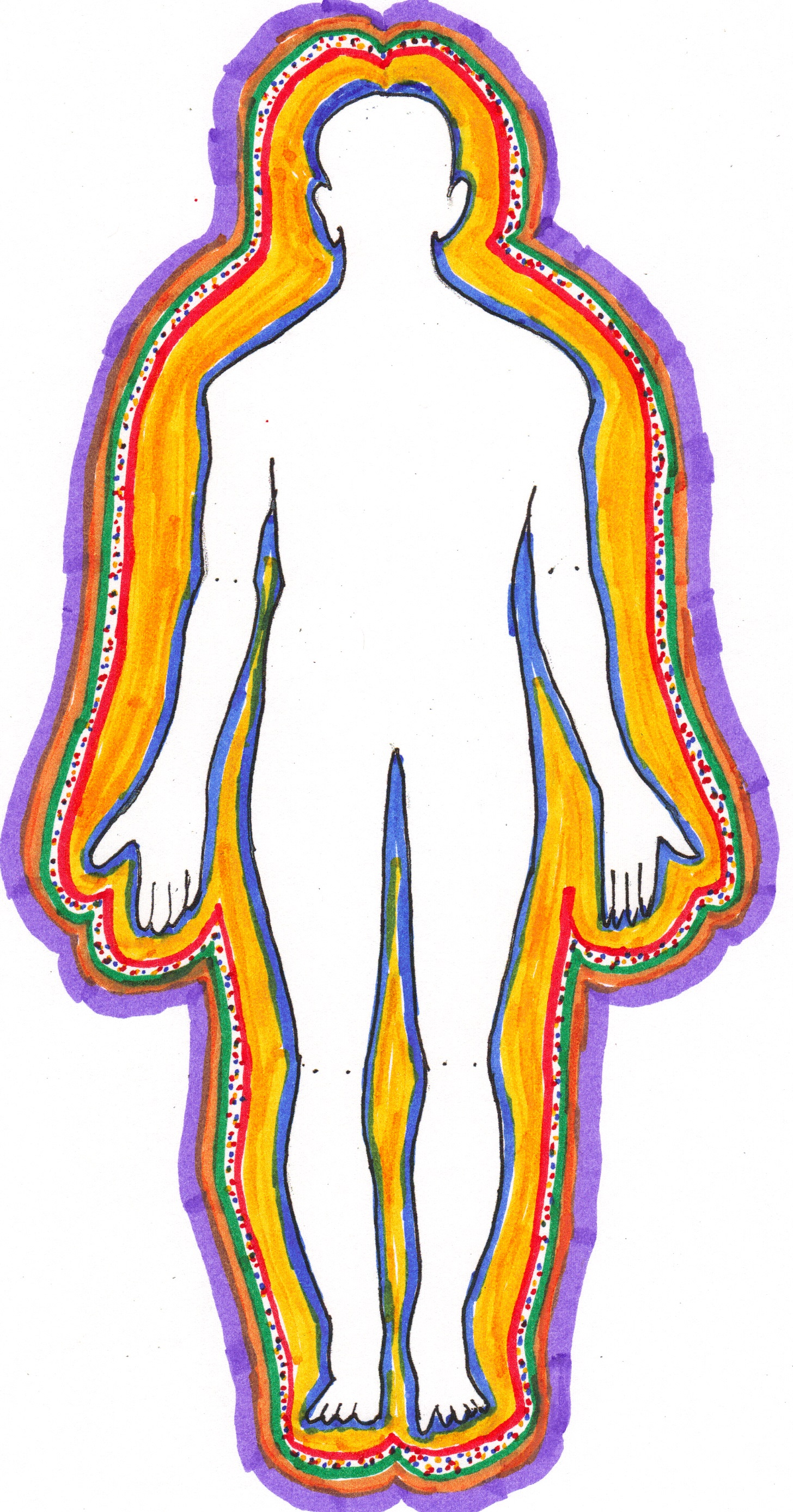 Dibujo de la silueta humana realizado a mano alzada en lapiz de grafito y coloreado al rededor con marcadores de tinta de agua de diferentes colores